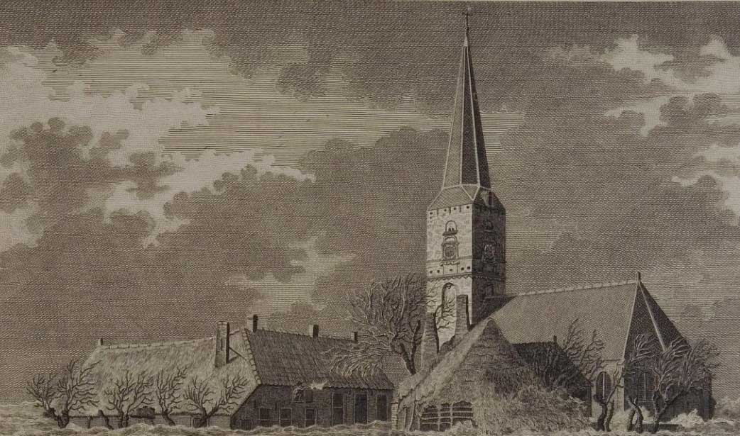 Kerk Doornspijk tijdens de overstroming van 4 februari 1825 (uitsnede uit een grotere prent)